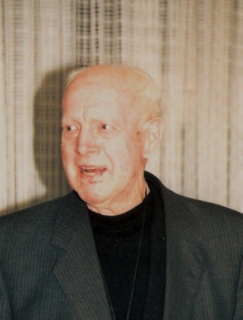 Bruder Schröer in der Jugendhilfe Johannesburg ca. 1985